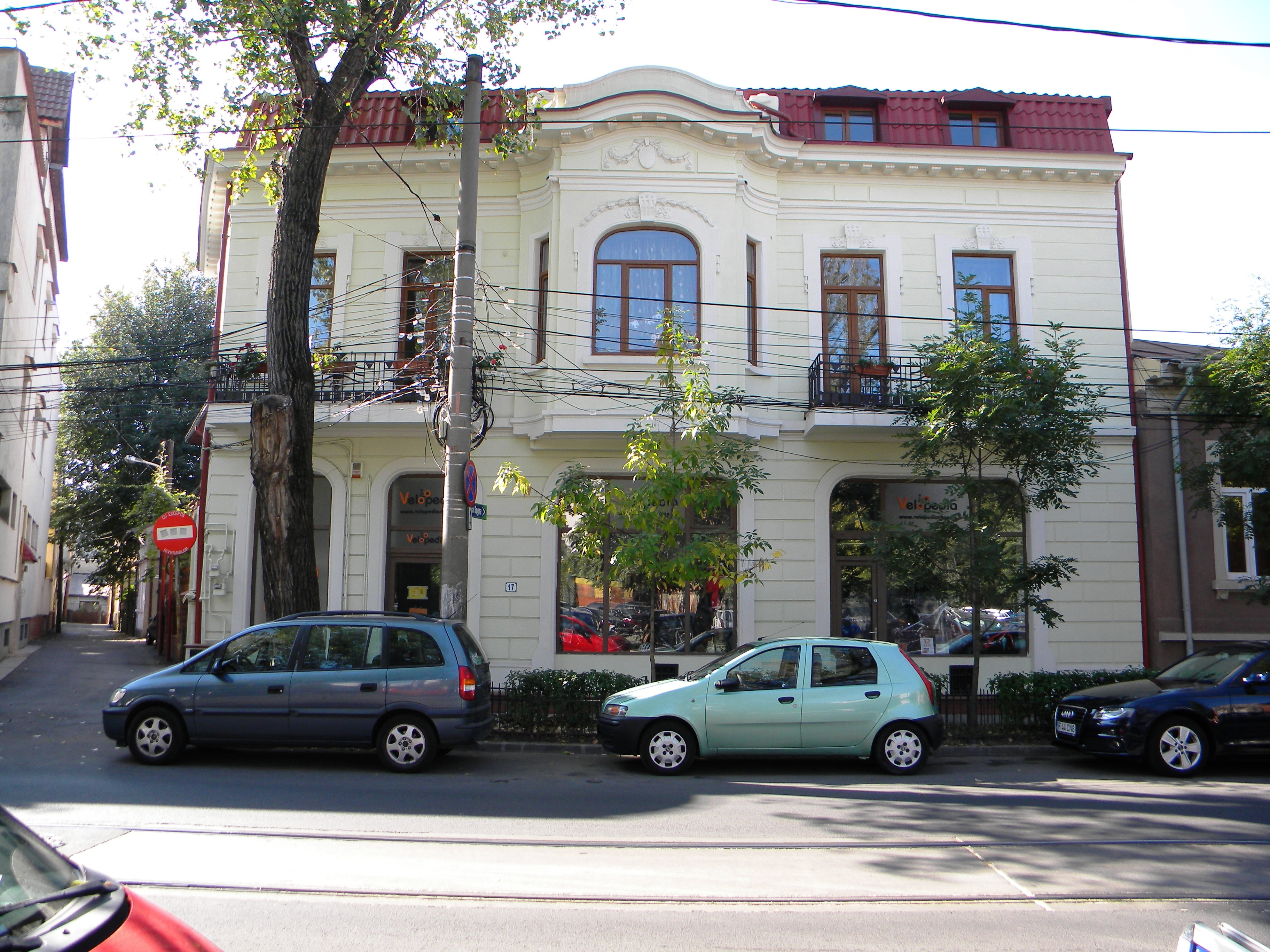 Bucuresti, Romania, Str. Alexandru Ioan Cuza nr. 17 (1); B-II-m-B-18519